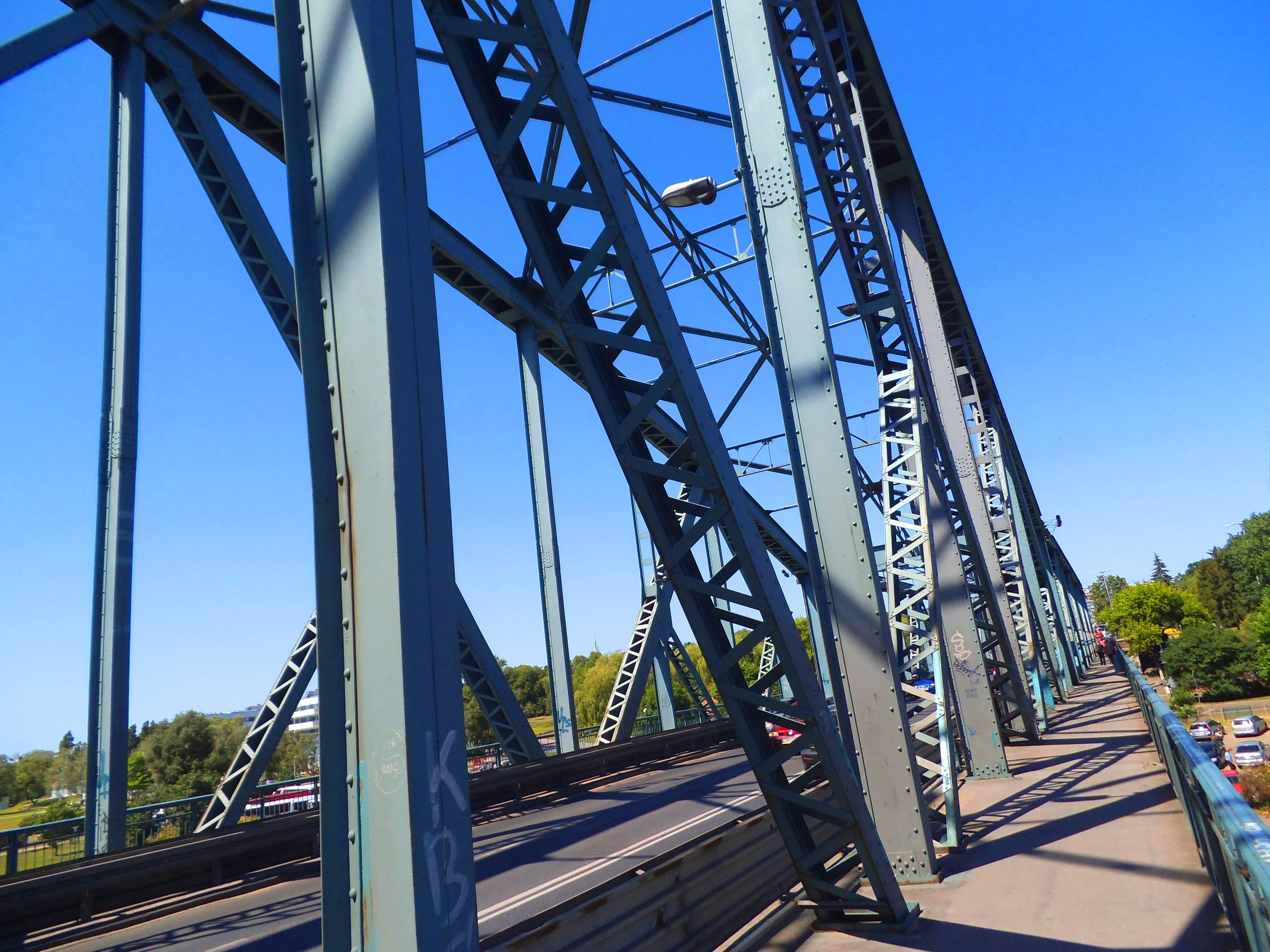 Most drogowy im. Józefa Piłsudskiego w Toruniu 99